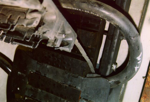 Transrapid-Versuchsanlage Emsland, Motorwicklung des Transrapid, Stator